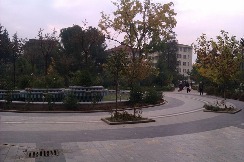 Düzce il merkezinde parktan görüntü